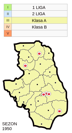 Jagiellonia w sezonie 1950 - mapa klubów